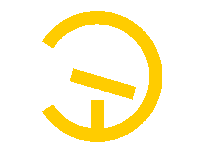 Mark og German 24 Panzer Division during WWII